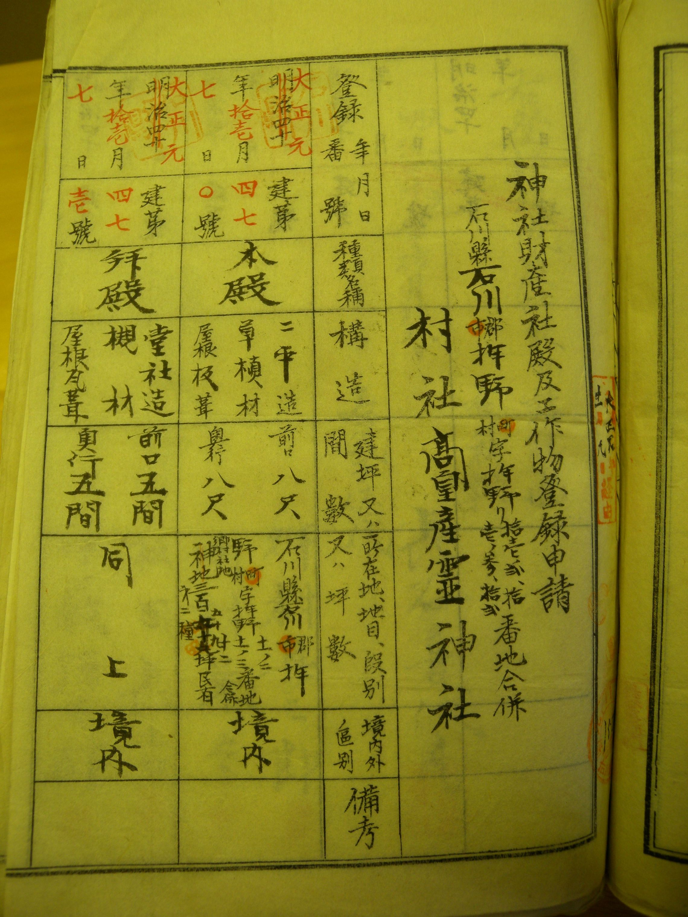 創建当時の神社仕様